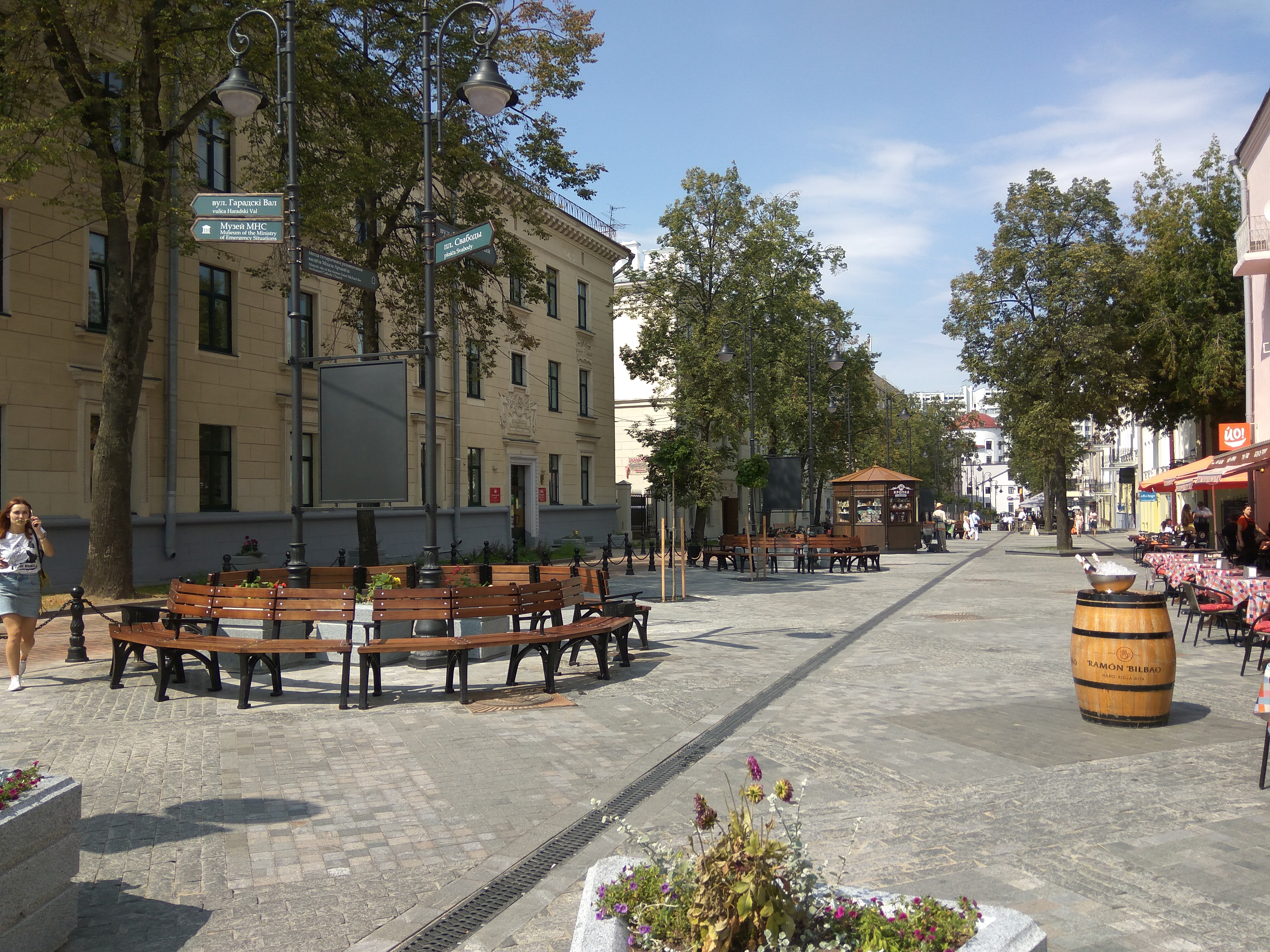 Мінск. Пешаходная Камсамольская (жнівень 2018)